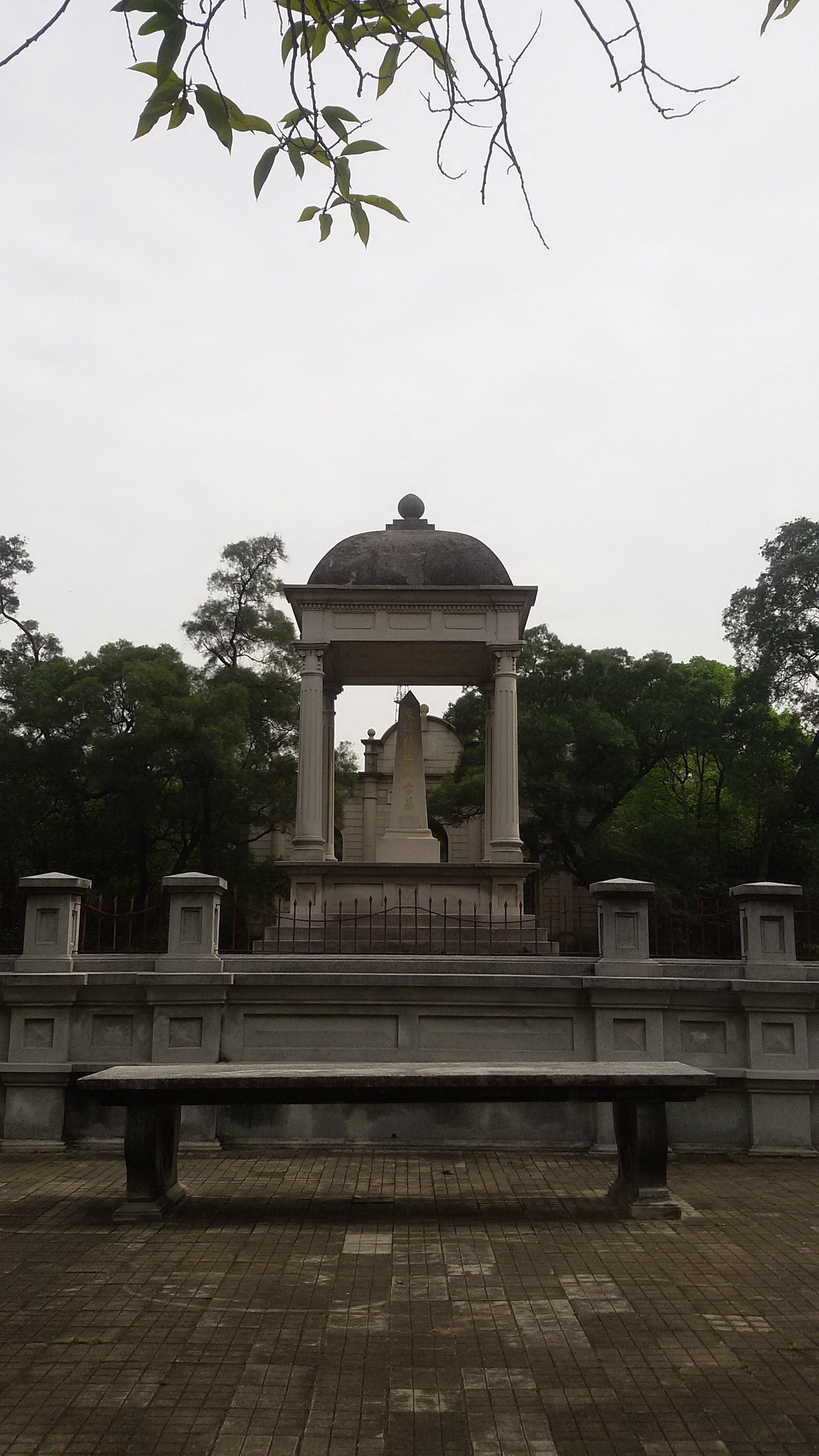 粵語: 東江陣亡烈士墓